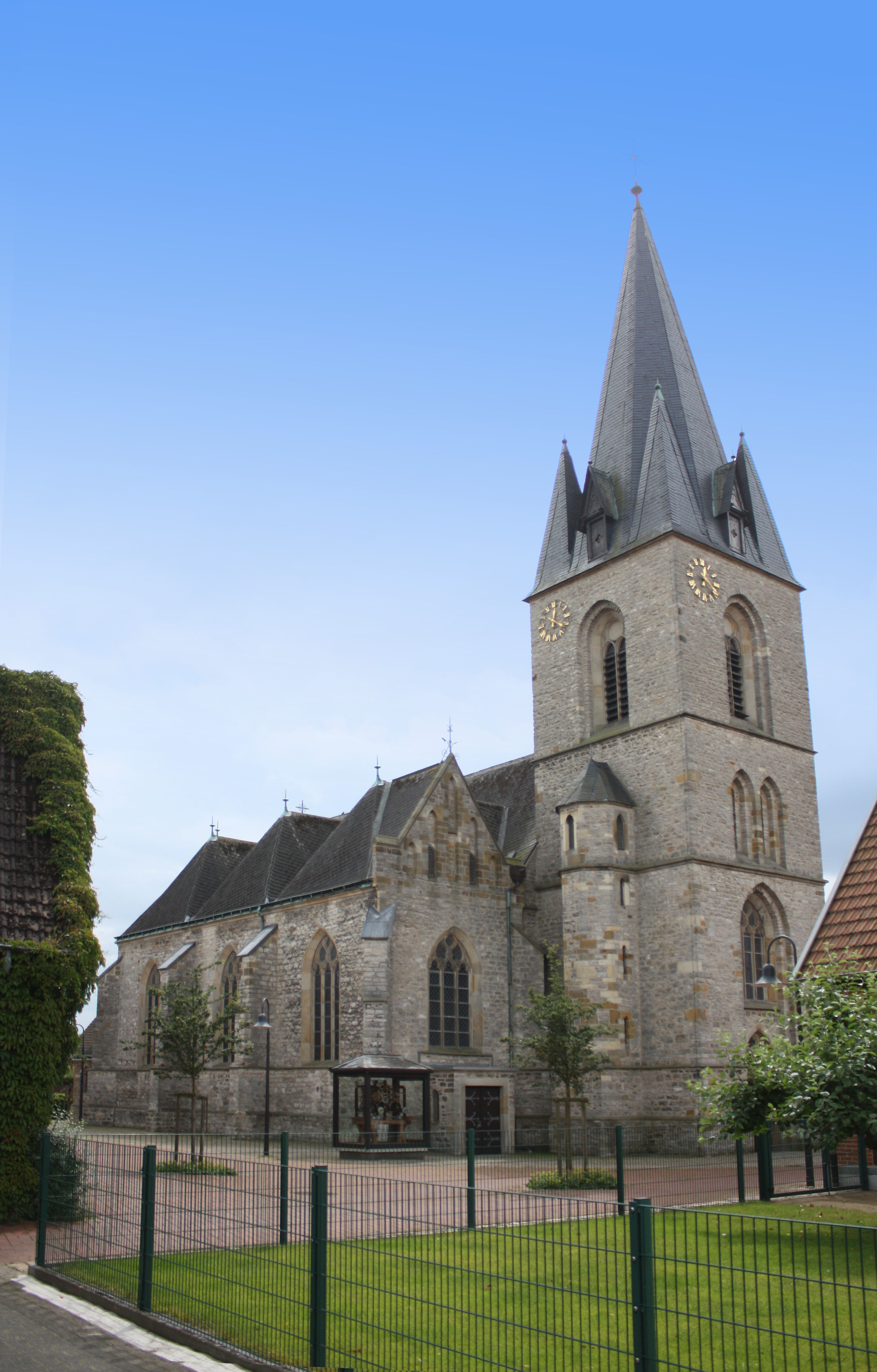 St. Johannes der Täufer Greffen